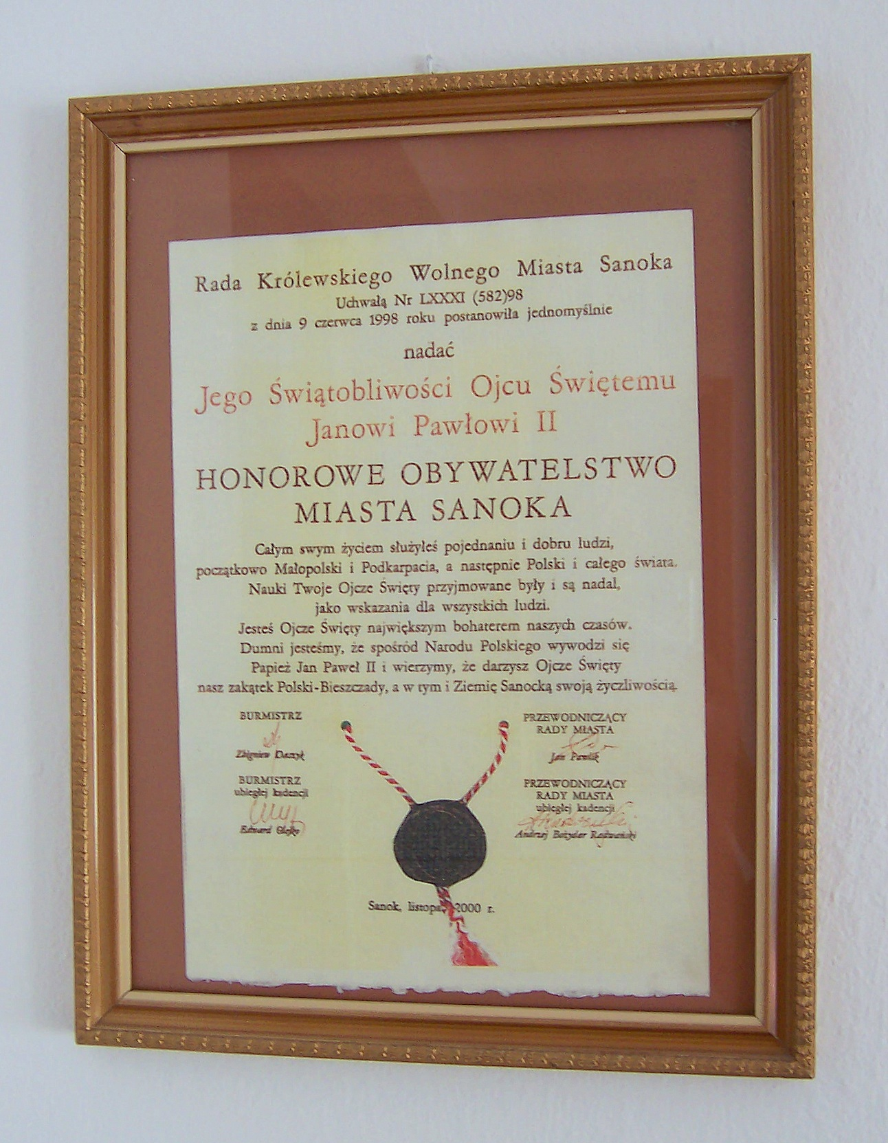 Dyplom nadania honorowego obywatelstwa miasta Sanoka Janowi Pawłowi II (nadanego 9 czerwca 1998), wydany w listopadzie 2000. Oprawiony i wywieszony w kancelarii parafii Przemienienia Pańskiego w Sanoku.